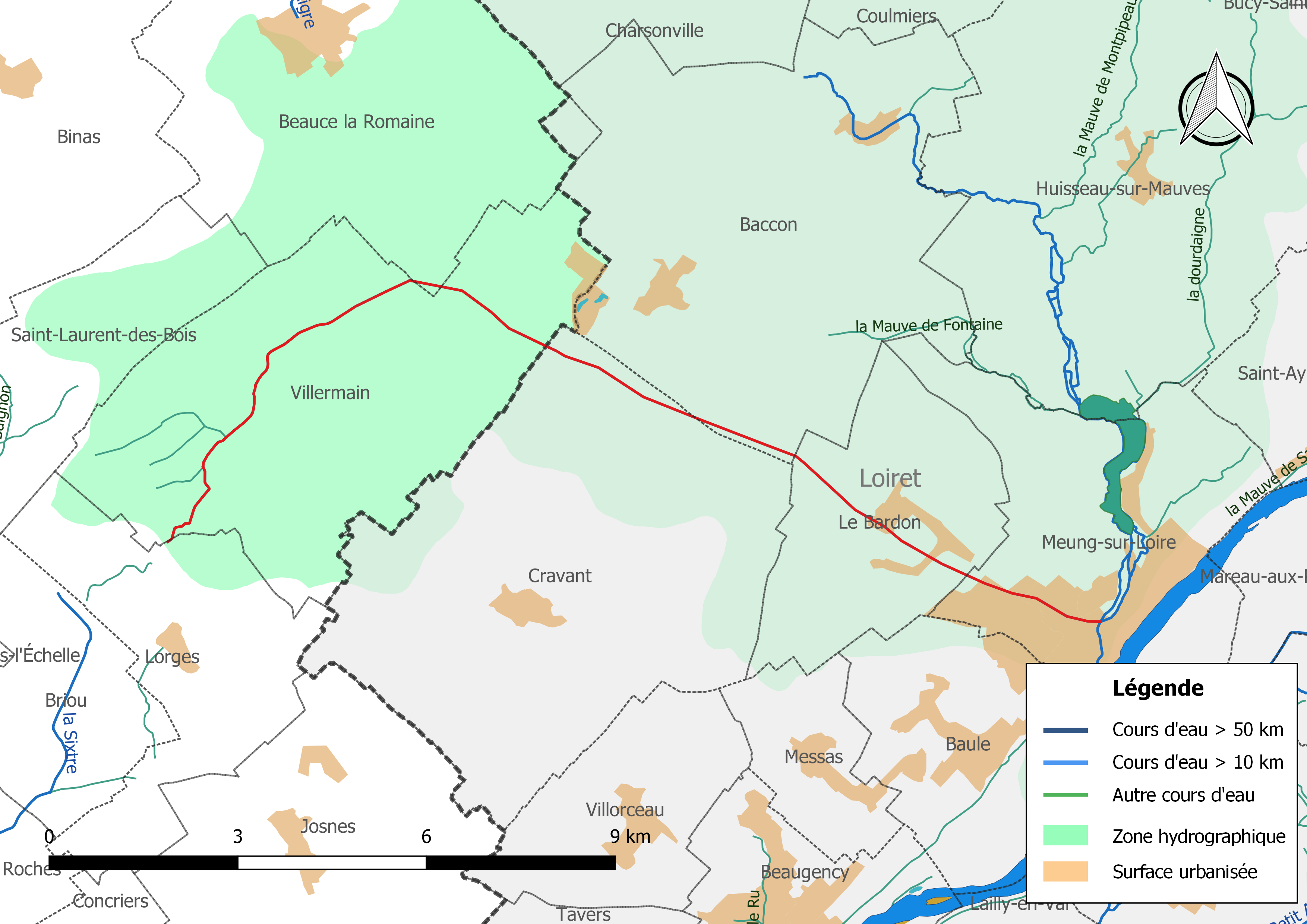 Carte du cours d'eau « la Grande Évière » et de son bassin versant (zone hydrographique dans laquelle il s'insère).